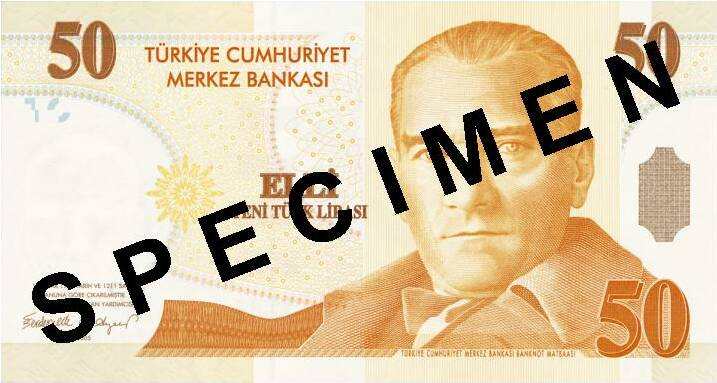 50 YTL ön